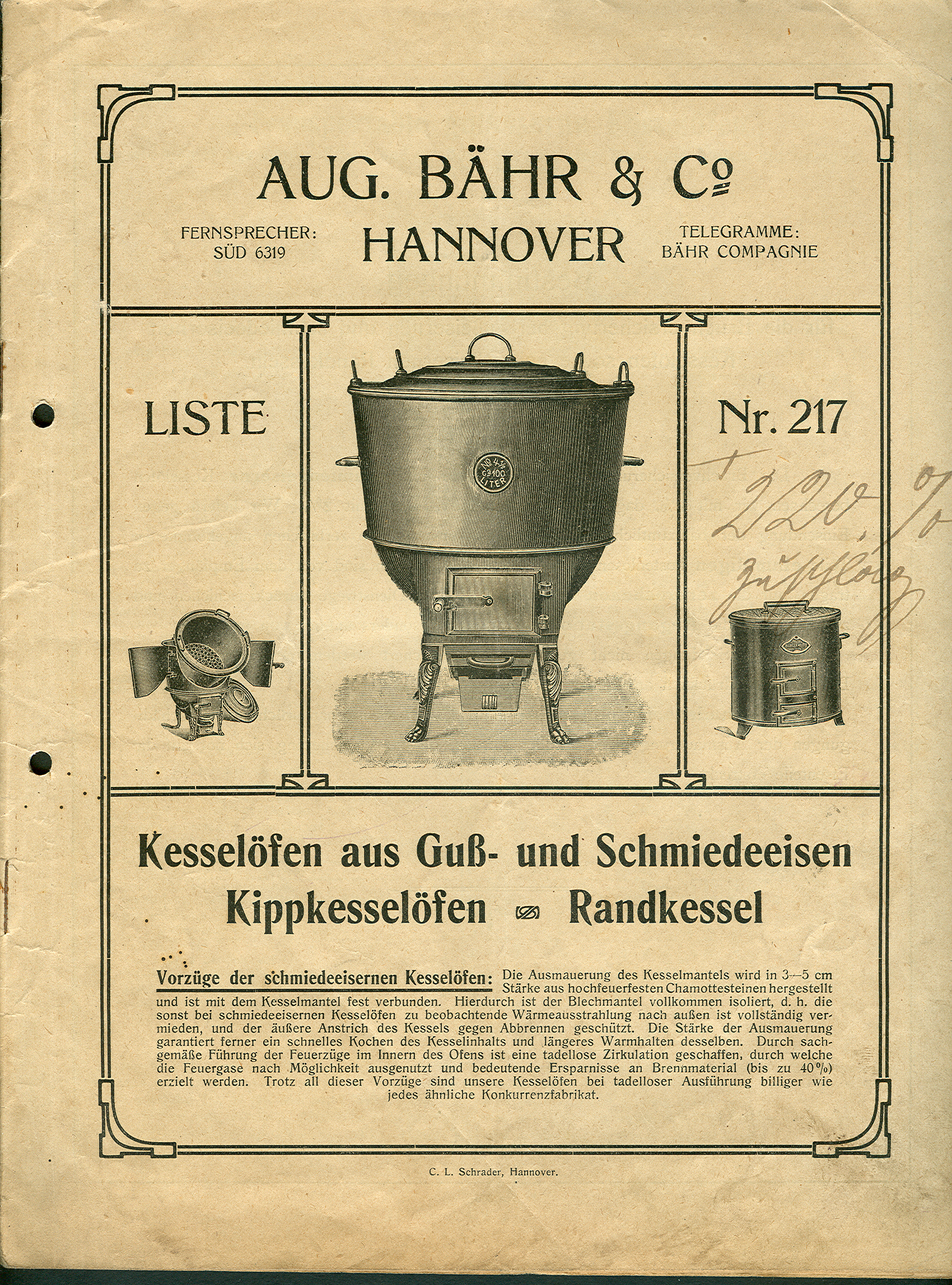 Titelseite der mit Heftklammern gebundenen "Liste 217" der Firma Aug. Bähr & Co. in Hannover: "Kesselöfen aus Guß- und Schmiedeeisen Kippkesselöfen Randkessel ..."